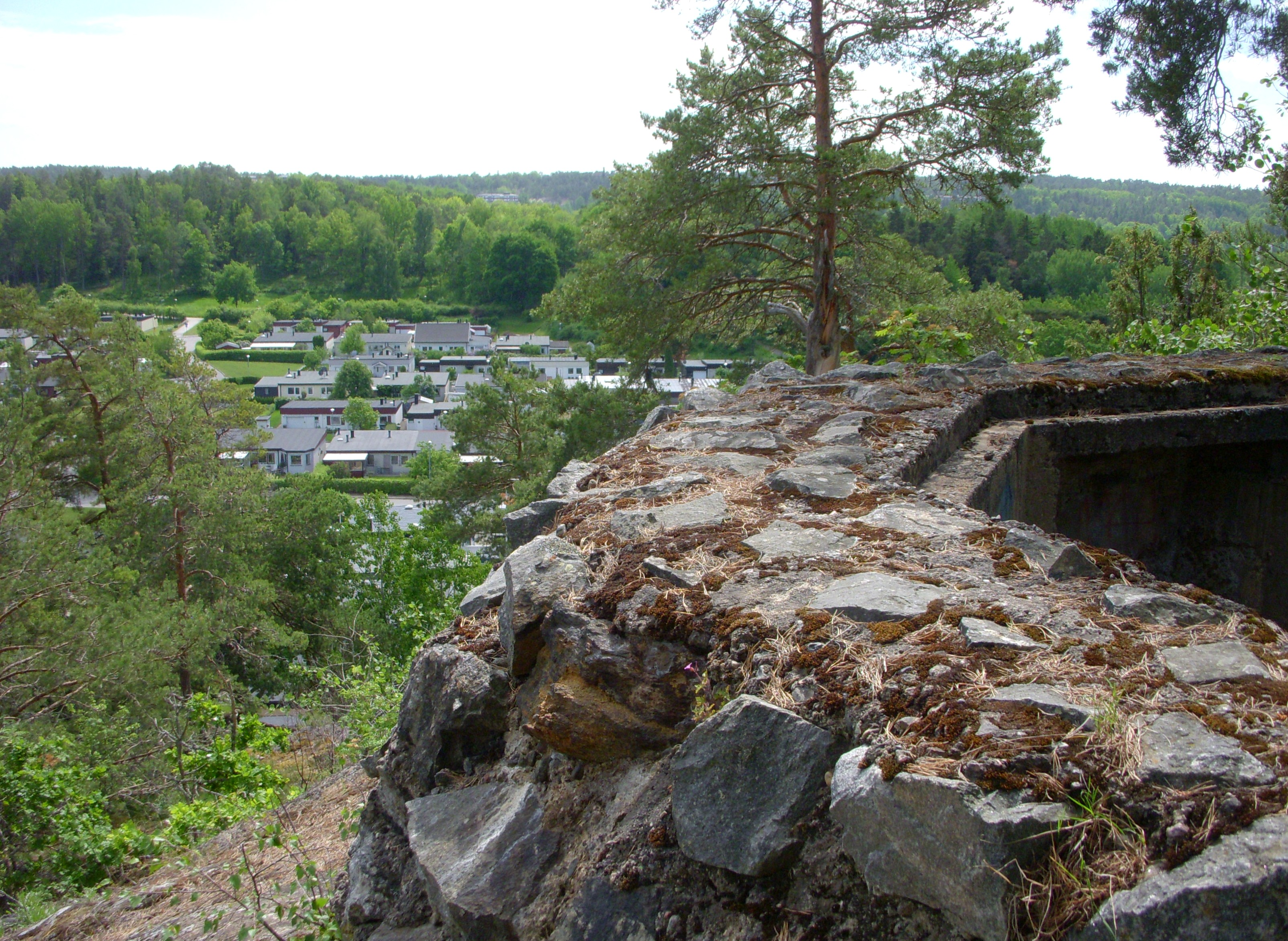 Norsborgs luftvärnsställning ca. 1000 meter norost om Norsborgs vattenverk